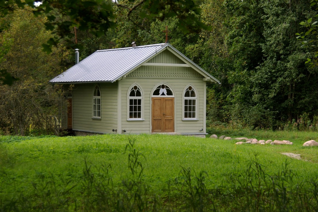 Pikva Miikaeli kabel asub Anija vallas Pikva külas